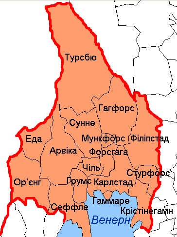 Карта адміністративного поділу лену Вермланд у Швеції. Карту створено на основі карти File:Värmland County.png.